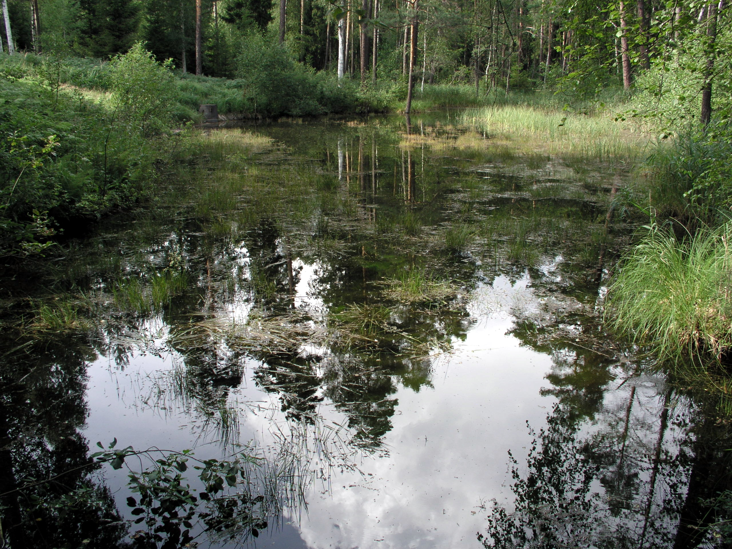 Storkällan, Tyresö, Sweden